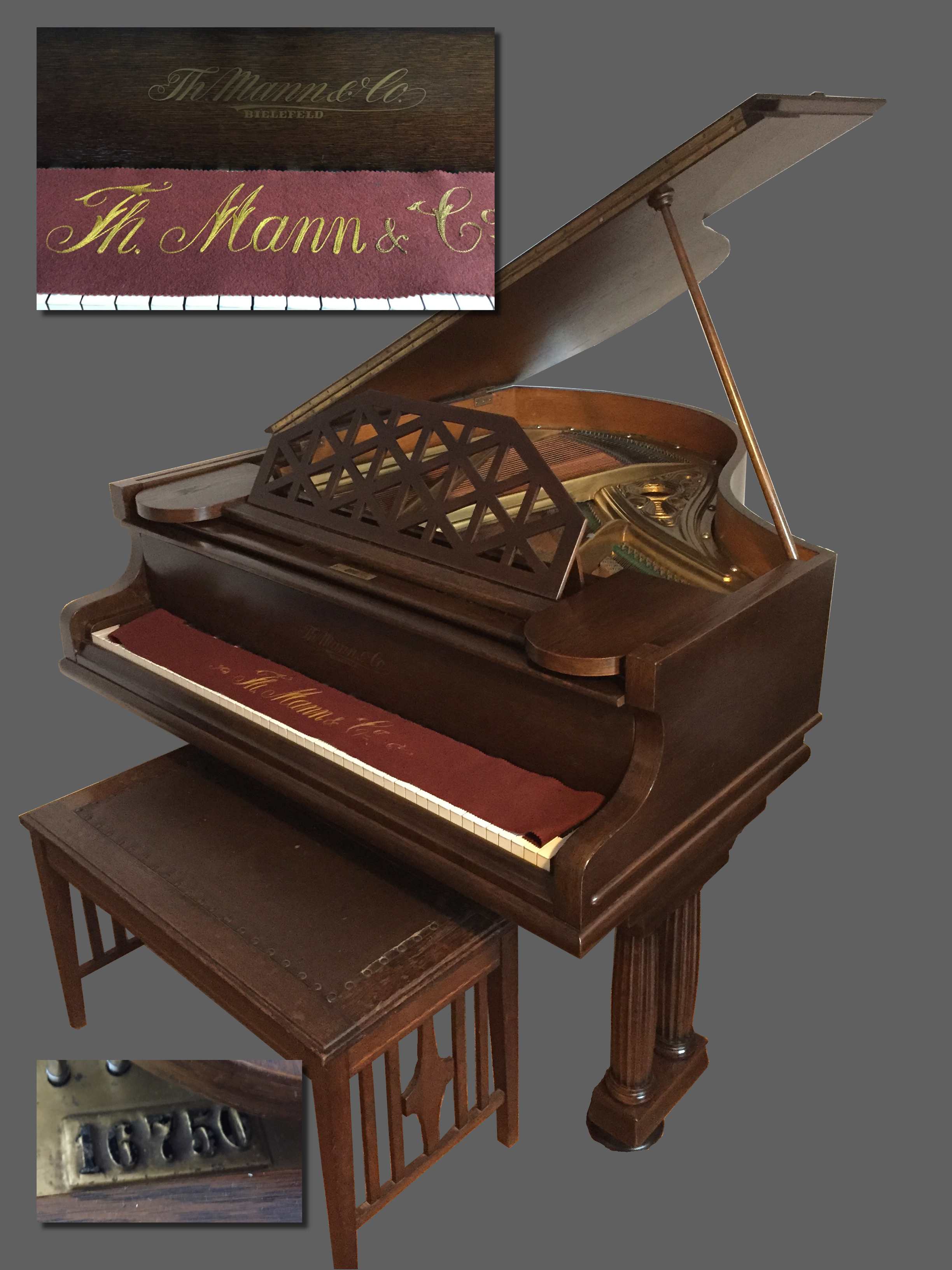 Stutzflügel in Eiche von Th. Mann & Co, Bielefeld mit der Seriennummer 16750 aus dem Jahr 1911.